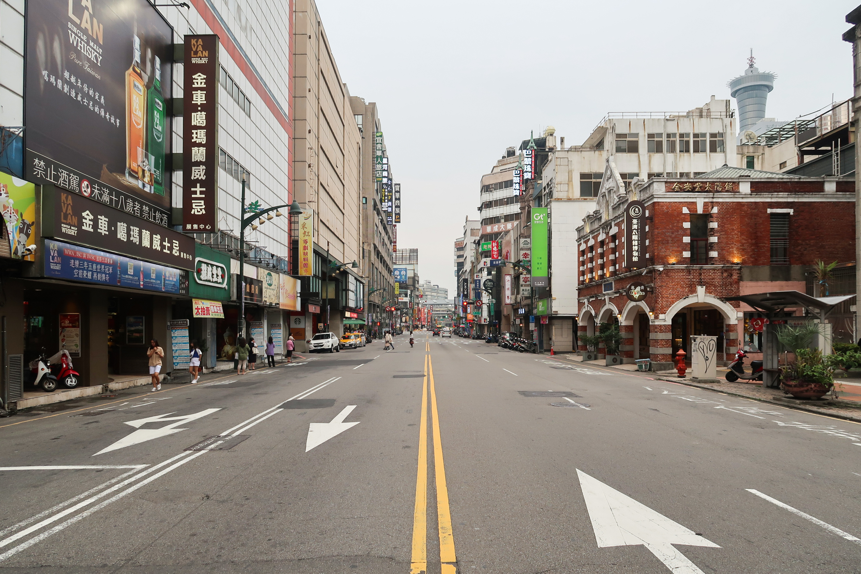 成功路台中中區